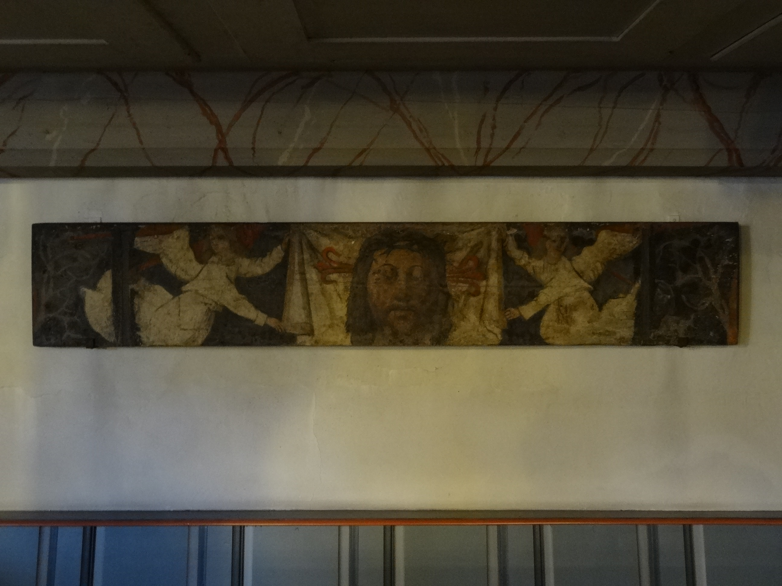 Evangelische Kirche Dornholzhausen